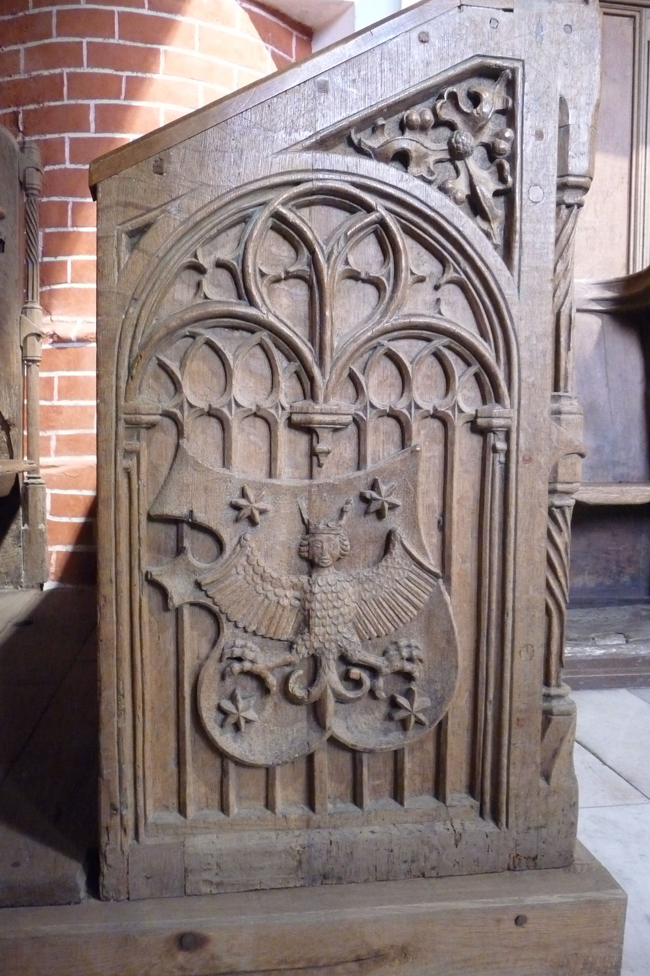 Chorpultseite des nördlichen Grafenstuhls mit dem Cirksenawappen